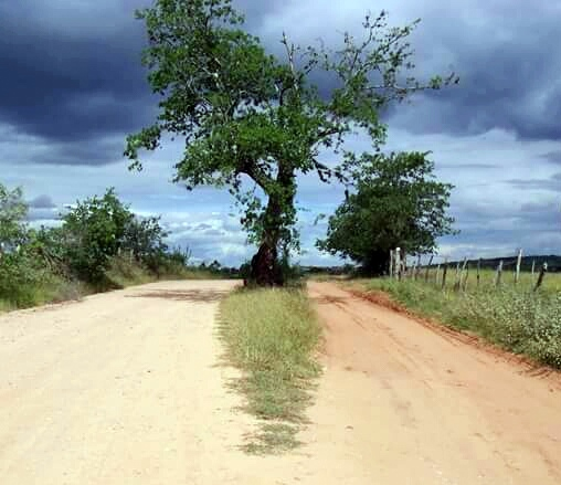 Baraúna histórica, patrimônio histórico e natural de Araci - Bahia